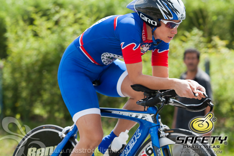 CRI. Campeonato Panamericano de Ciclismo de Ruta. Medellín. 6 de mayo de 2011. Licensing